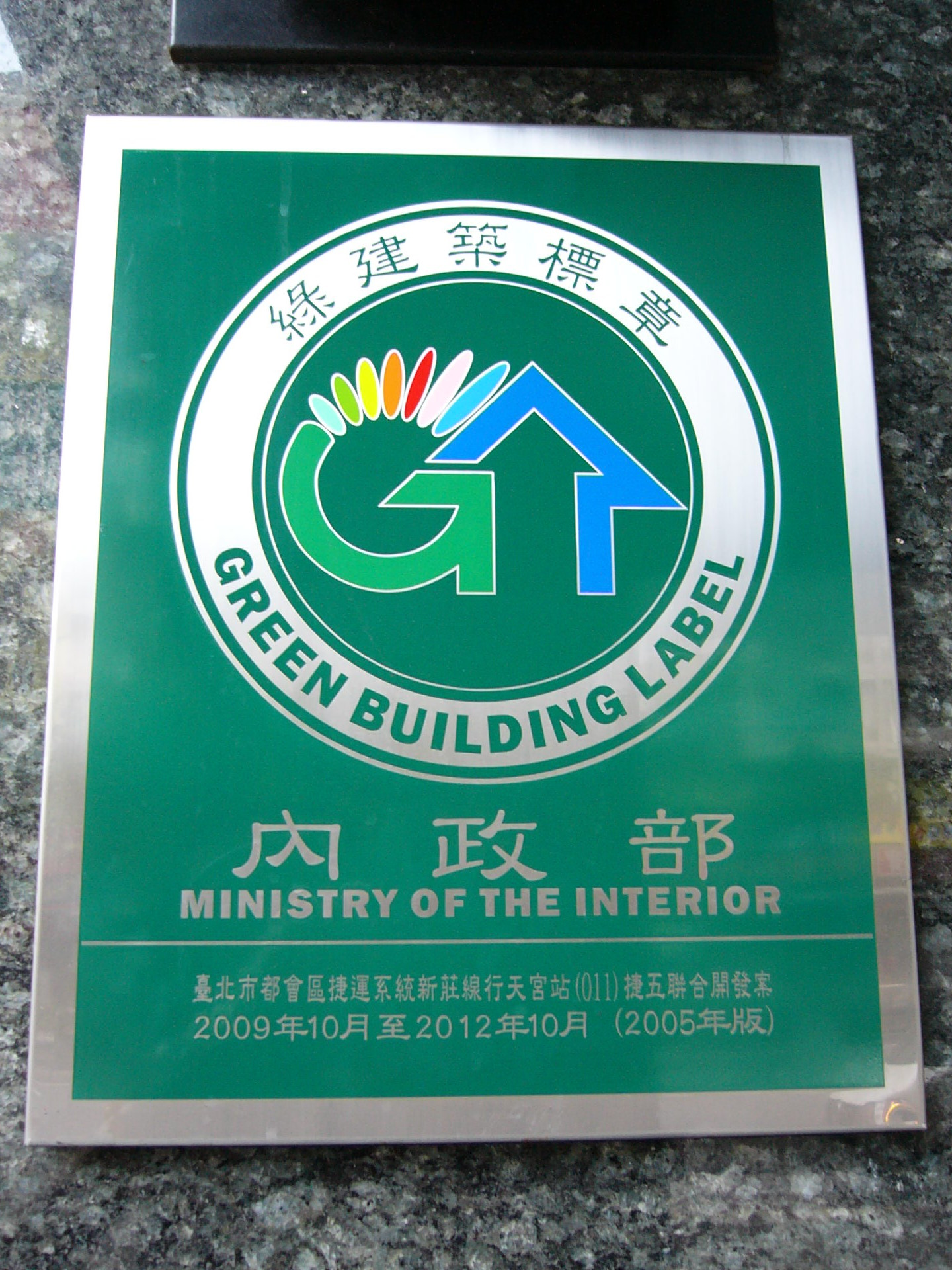 臺北捷運行天宮站聯合開發大樓獲得的中華民國內政部綠建築標章2005年版。